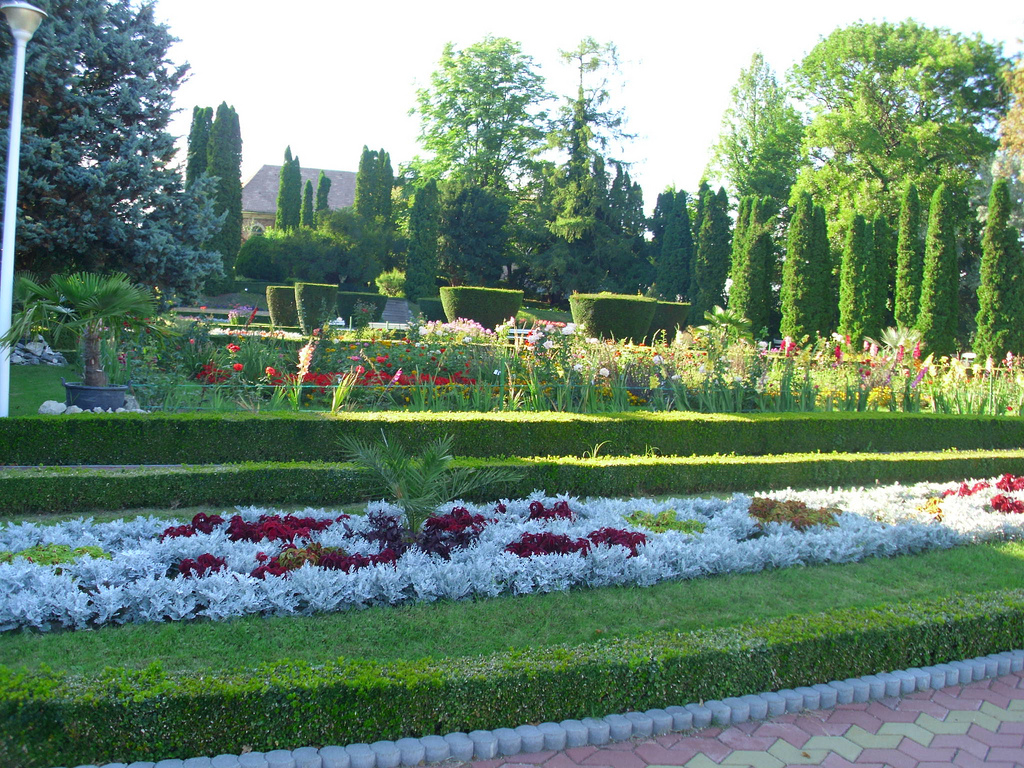 Fostul parc al Castelului Wesselenyi